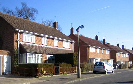 Hemel Hempstead: Kiln Ground, Bennetts End